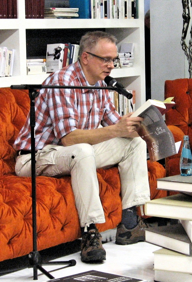 Michael Roes während einer Buchlesung auf der Frankfurter Buchmesse.